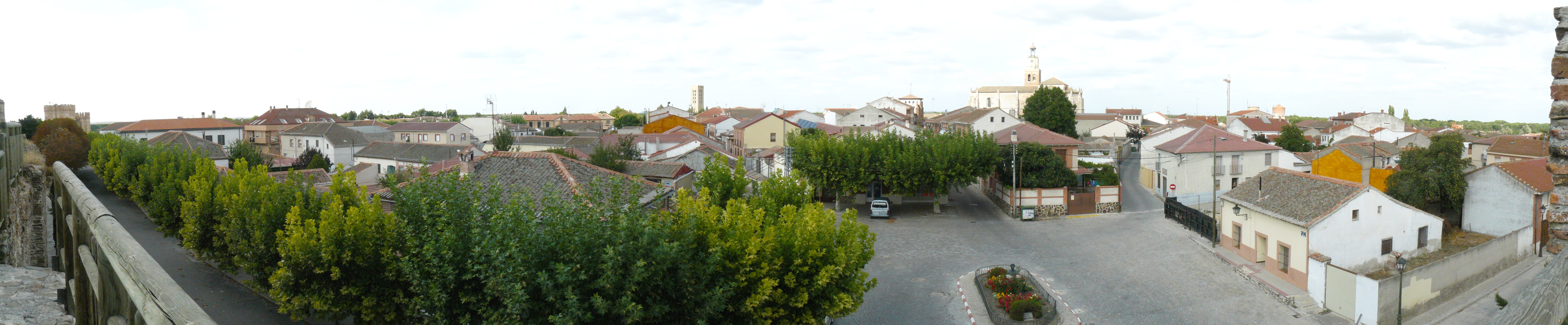 Vista de Coca (provincia de Segovia) desde la muralla. En el extremo izquierdo, el castillo, en el centro al fondo la torre de la desaparecida iglesia románica de San Nicolás y, a la derecha, la iglesia de Santa María la Mayor.